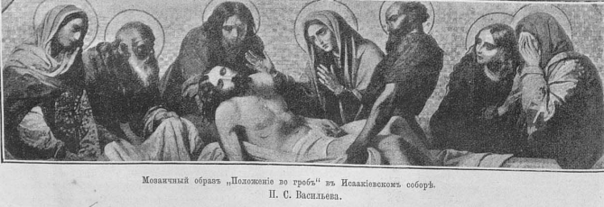 Васильев Павел Семёнович - Мозаичный образ Положение во гроб в Исаакиевском соборе